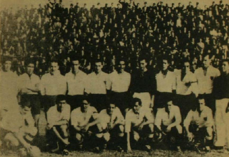 Colo-Colo año 1939